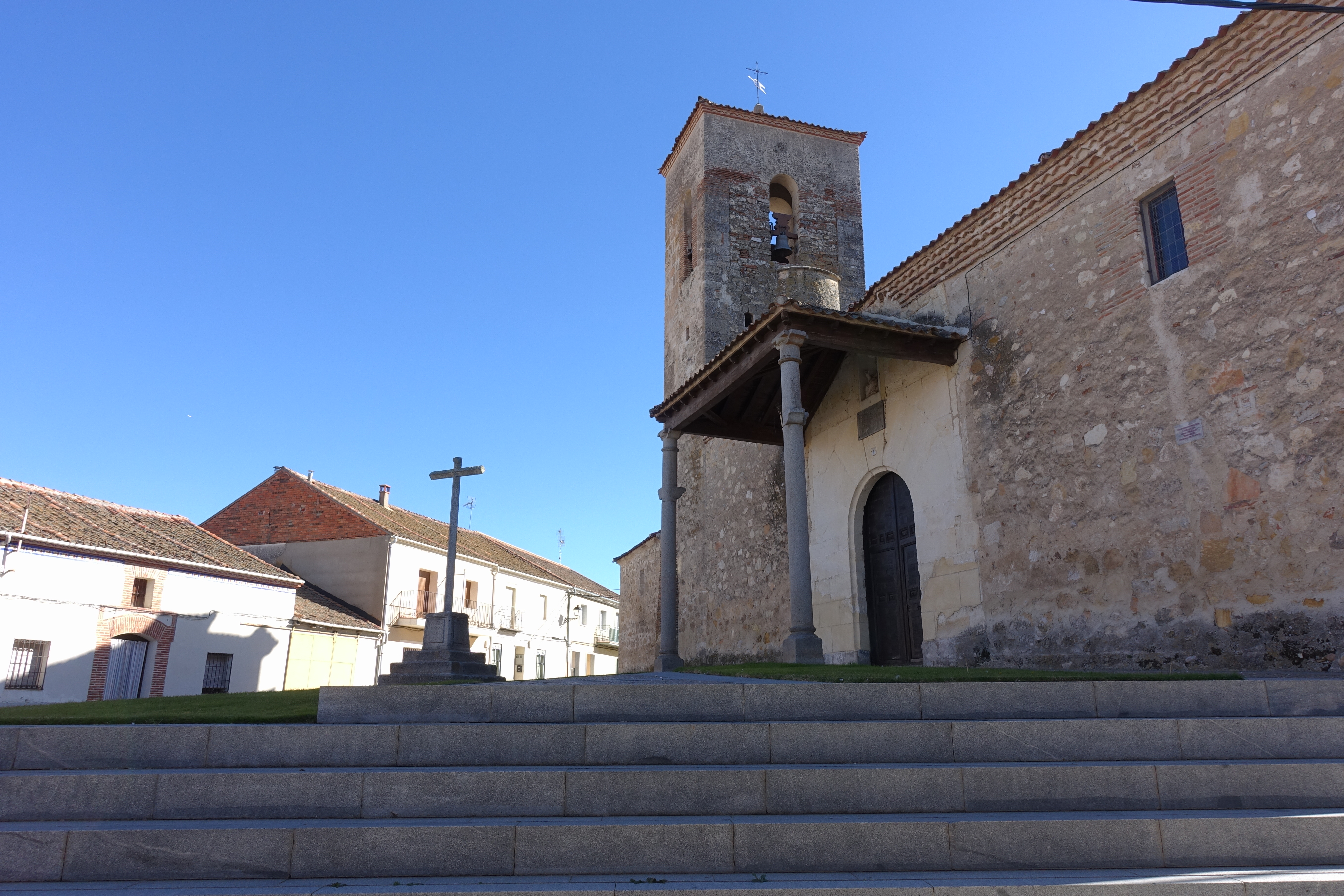 Iglesia de San Bartolomé, en Martín Miguel (Segovia, España).